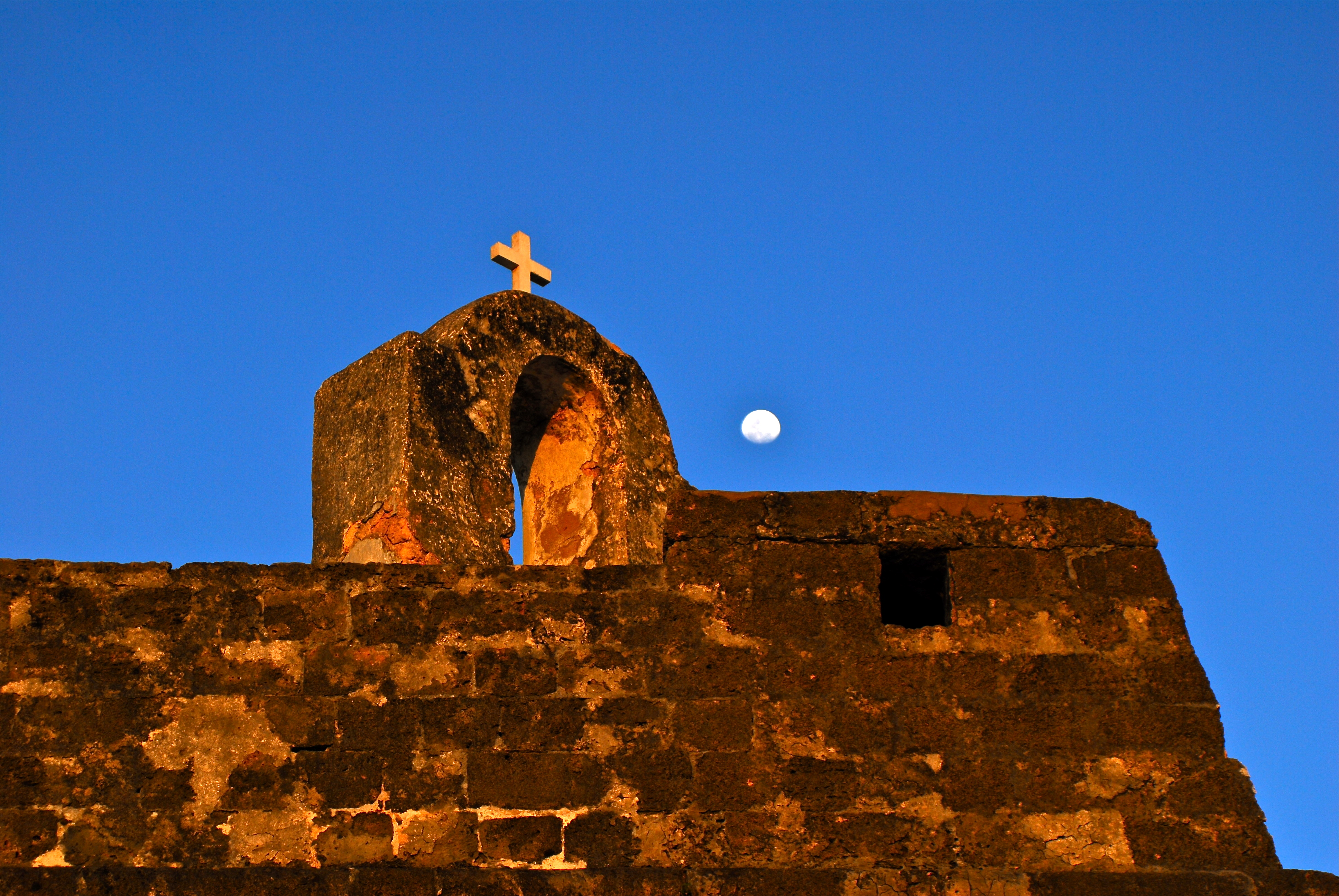 S. Sebastião fortress, Mozambique Island, Mozambique.